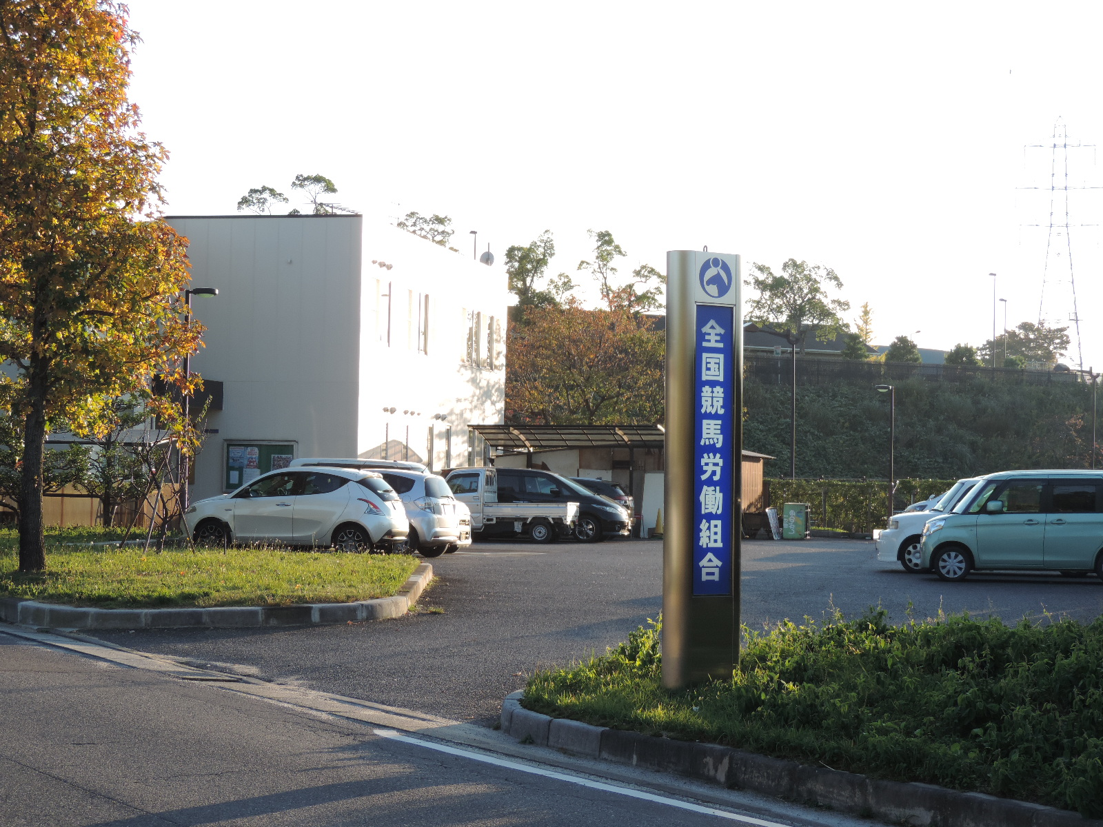 全国競馬労働組合本部（滋賀県栗東市）。2017年撮影